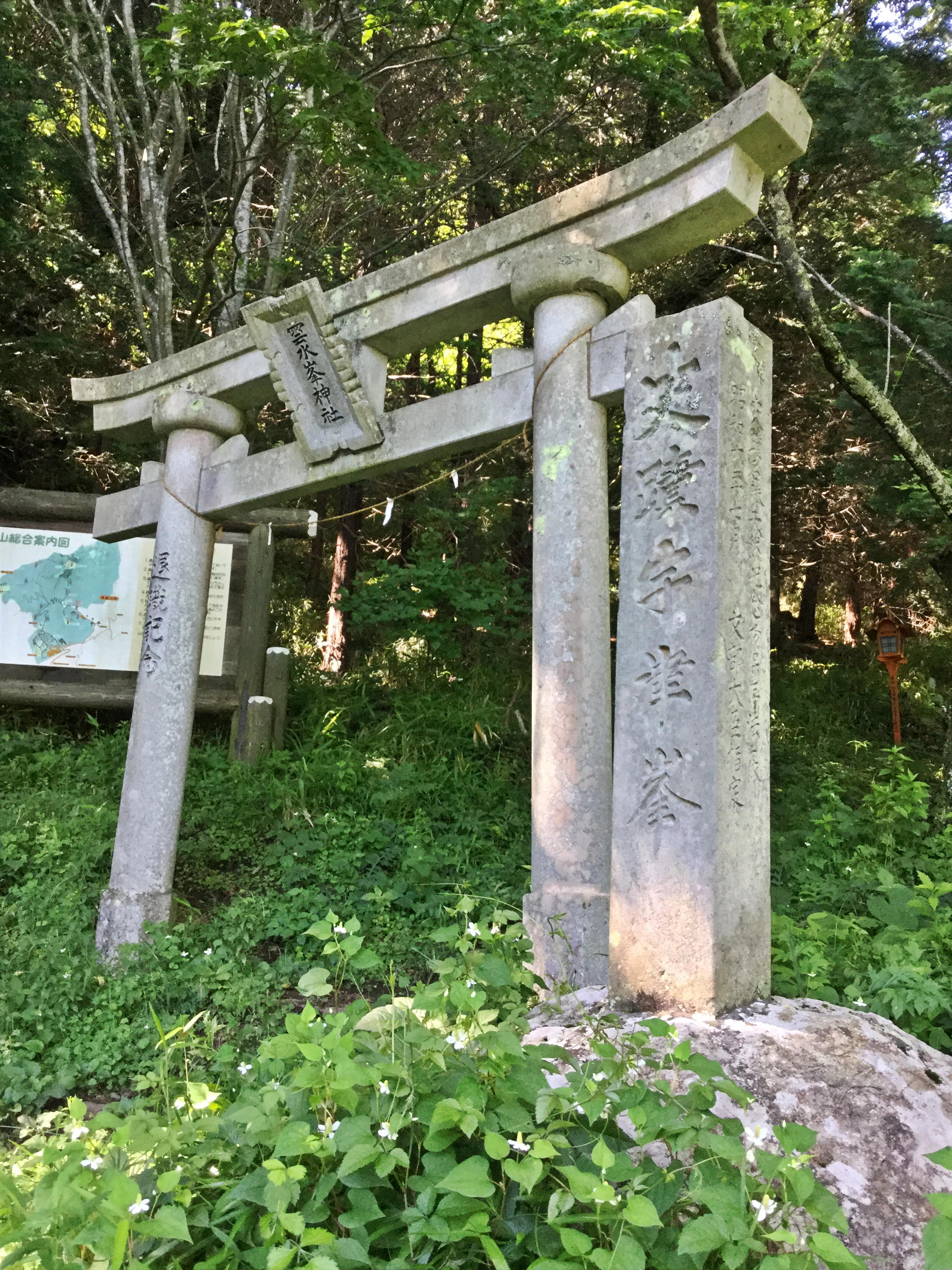 郡山市/須賀川市 史跡 宇津峰 入口